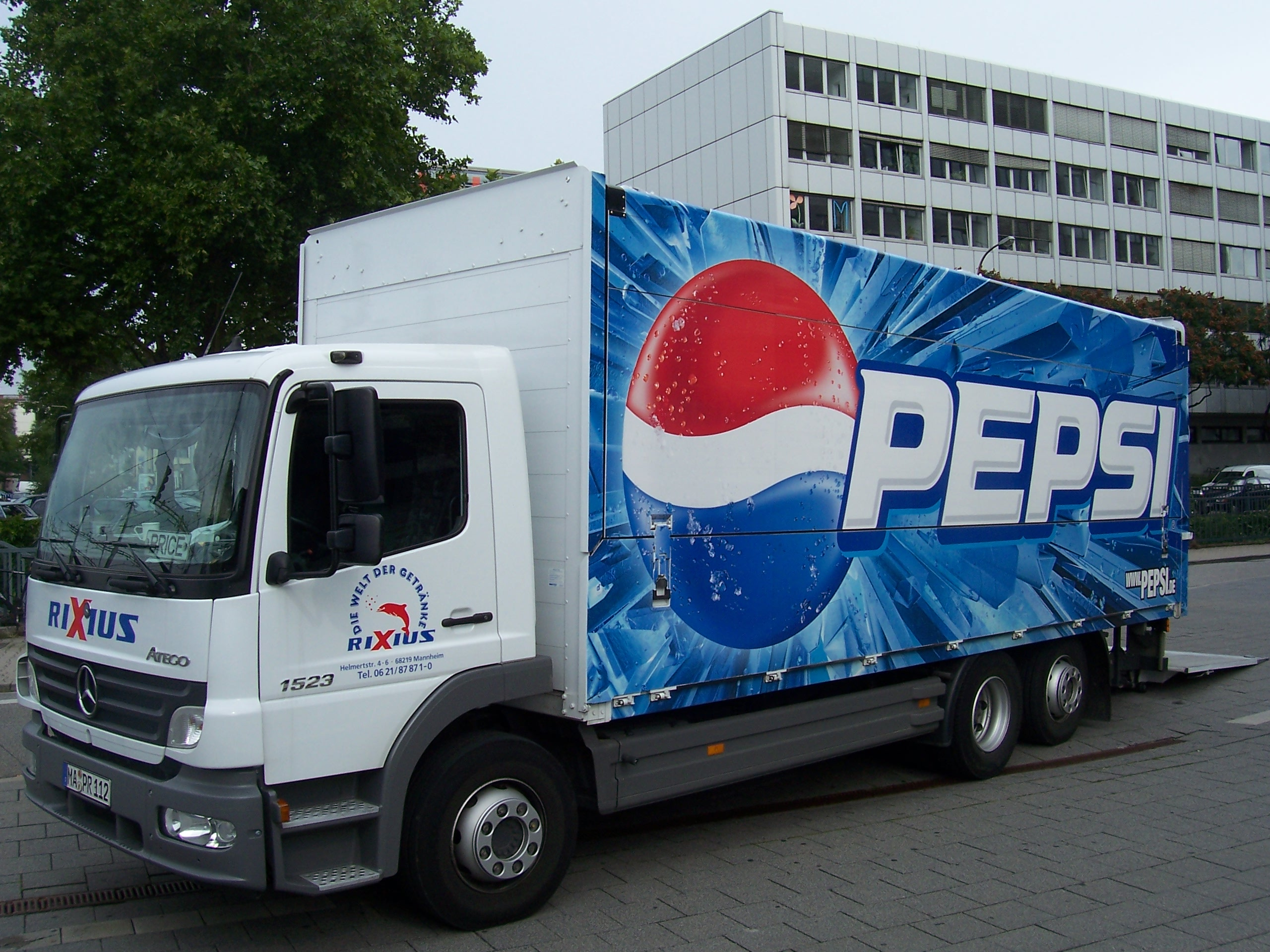 Ein Mercedes-Benz Atego-Laster mit Pepsi-Werbung in Mannheim